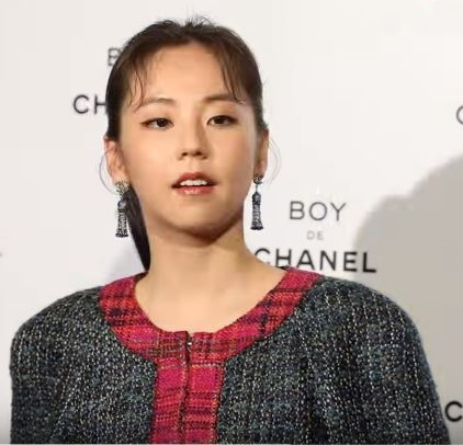 30일 오후 서울 성수동 LAYER57에서 남성을 위한 최초의 메이크업 라인 ‘보이드샤넬’ 론칭 축하 파티인 'CHANEL BE ONLY YOU’가 열렸다.